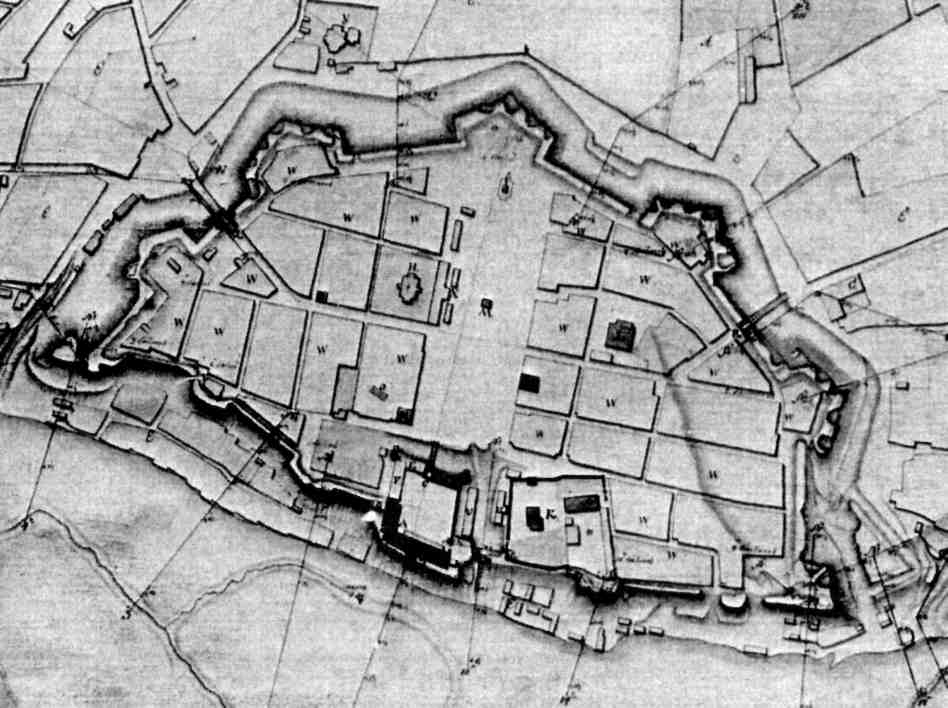 Беларуская (тарашкевіца): Быхаў (Bychaŭ). Плян места